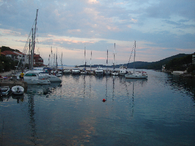 Bozava marine